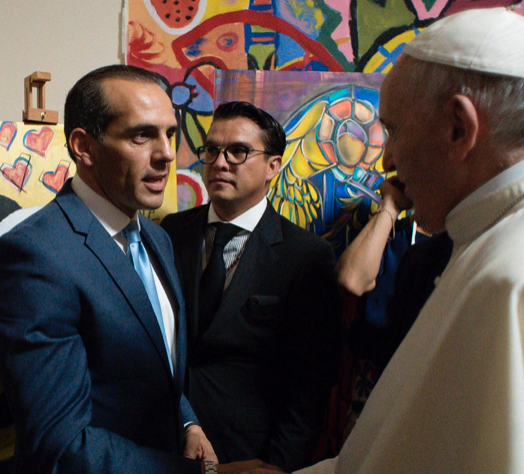 El trabajo de Juan Verde ha sido reconocido por el Papa Francisco.